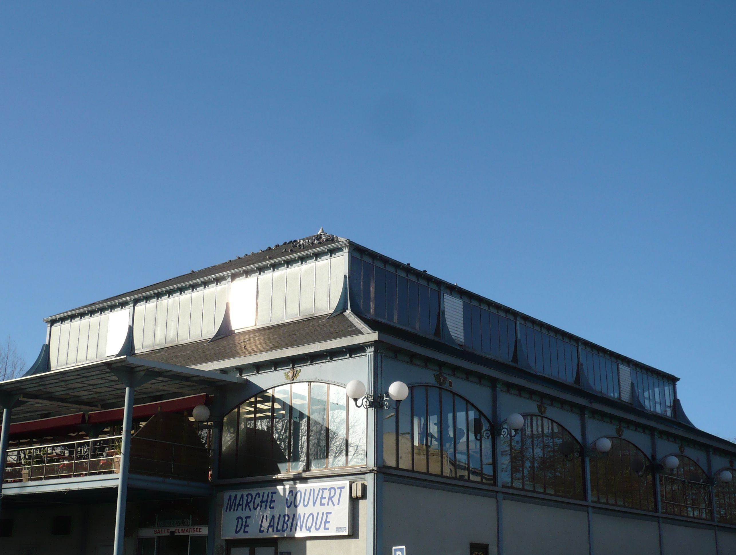 Castres